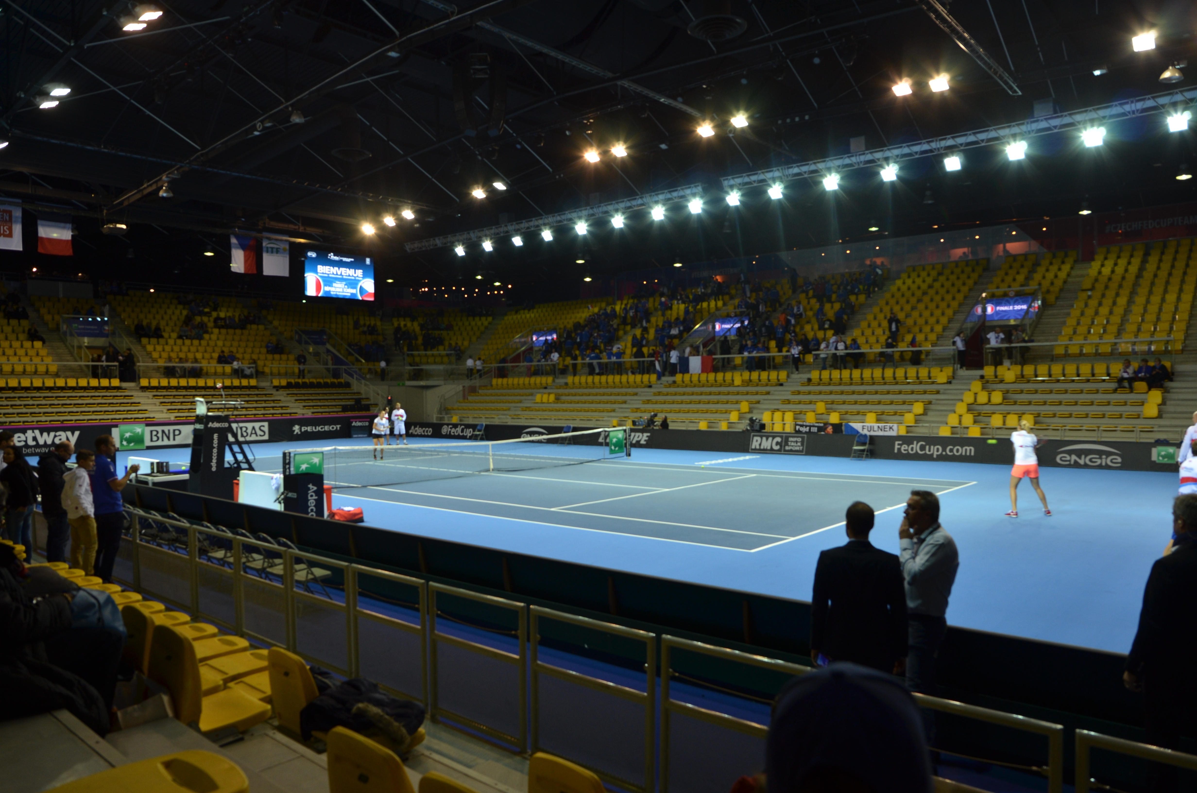 PPP_2938